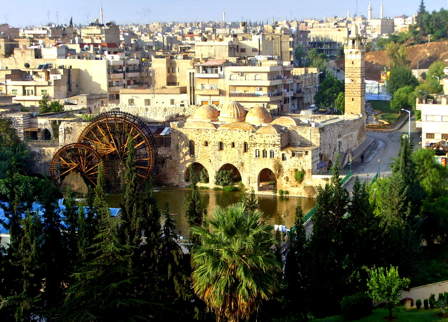 Hama